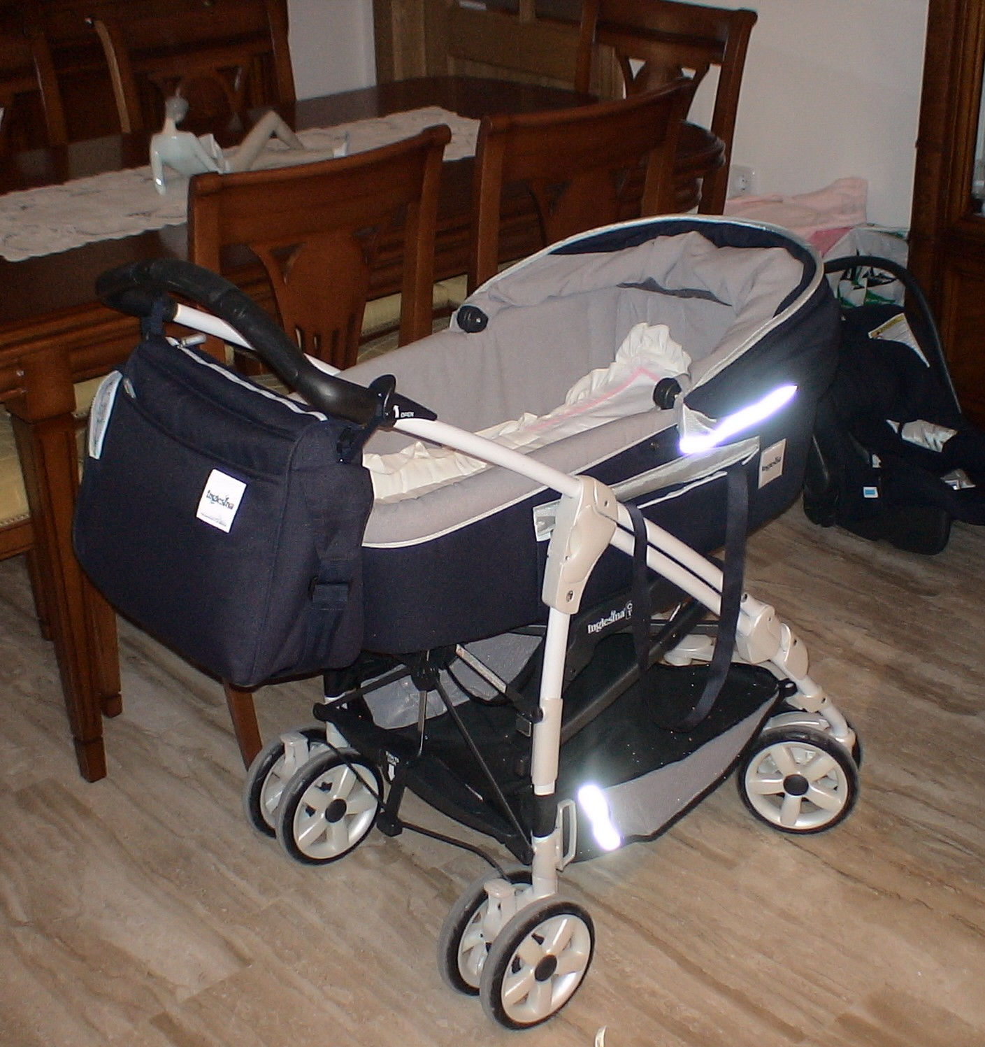 Inglesina Otutto Pram